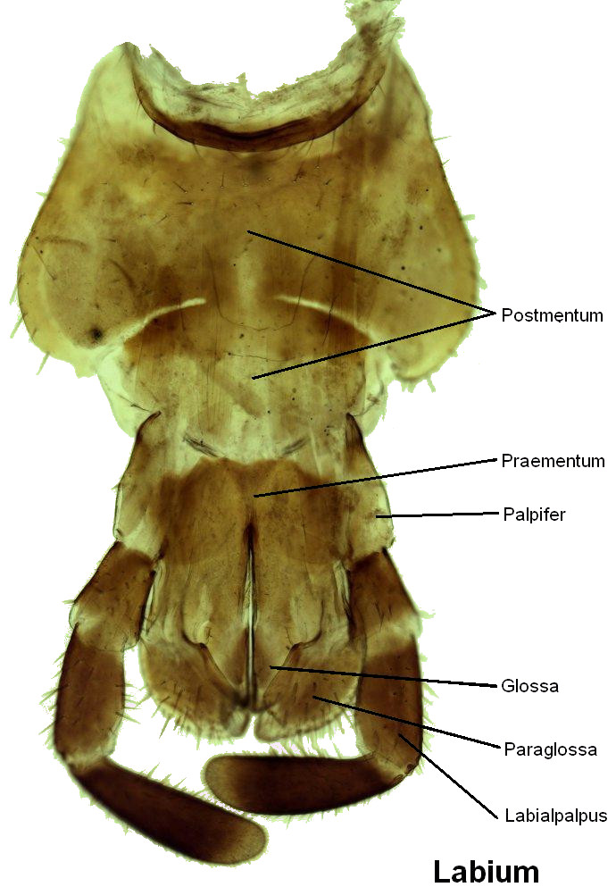 Labium von Periplaneta americana, beschriftet